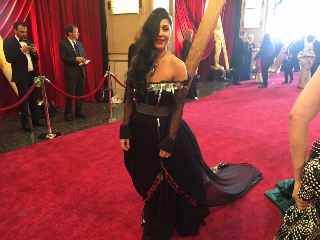 ندارد